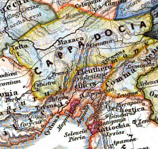 Kappadokien zum Beginn der Römerzeit